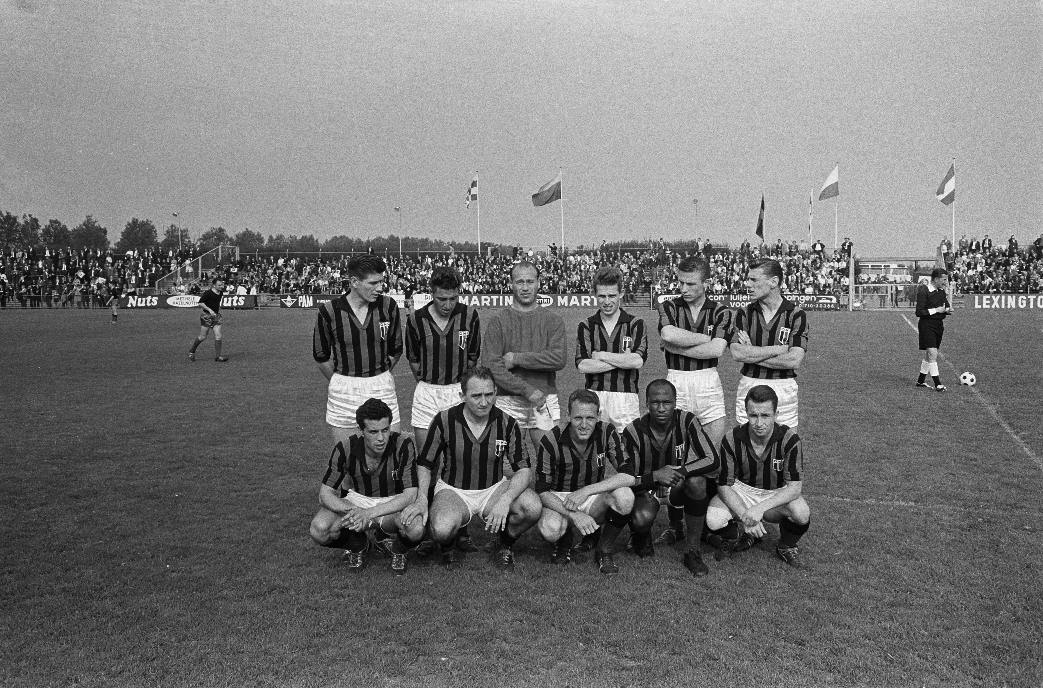 Collectie / Archief : Fotocollectie Anefo Reportage / Serie : [ onbekend ] Beschrijving : DHC tegen Excelsior 1-3. Elftal DHC Datum : 22 september 1963 Trefwoorden : elftallen, sport, voetbal Instellingsnaam : Excelsior Fotograaf : Walta, Winfried / Anefo Auteursrechthebbende : Nationaal Archief Materiaalsoort : Negatief (zwart/wit) Nummer archiefinventaris : bekijk toegang 2.24.01.05 Bestanddeelnummer : 915-5504